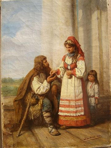 Подаяние, в Смоленске. Холст, масло Размер: 28 х 20 см